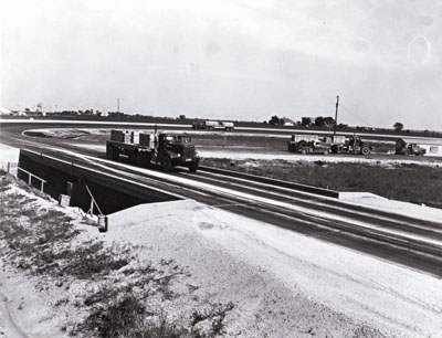 Belastungstest einer Brücke im Zuge der AASHO Road Test Untersuchungen